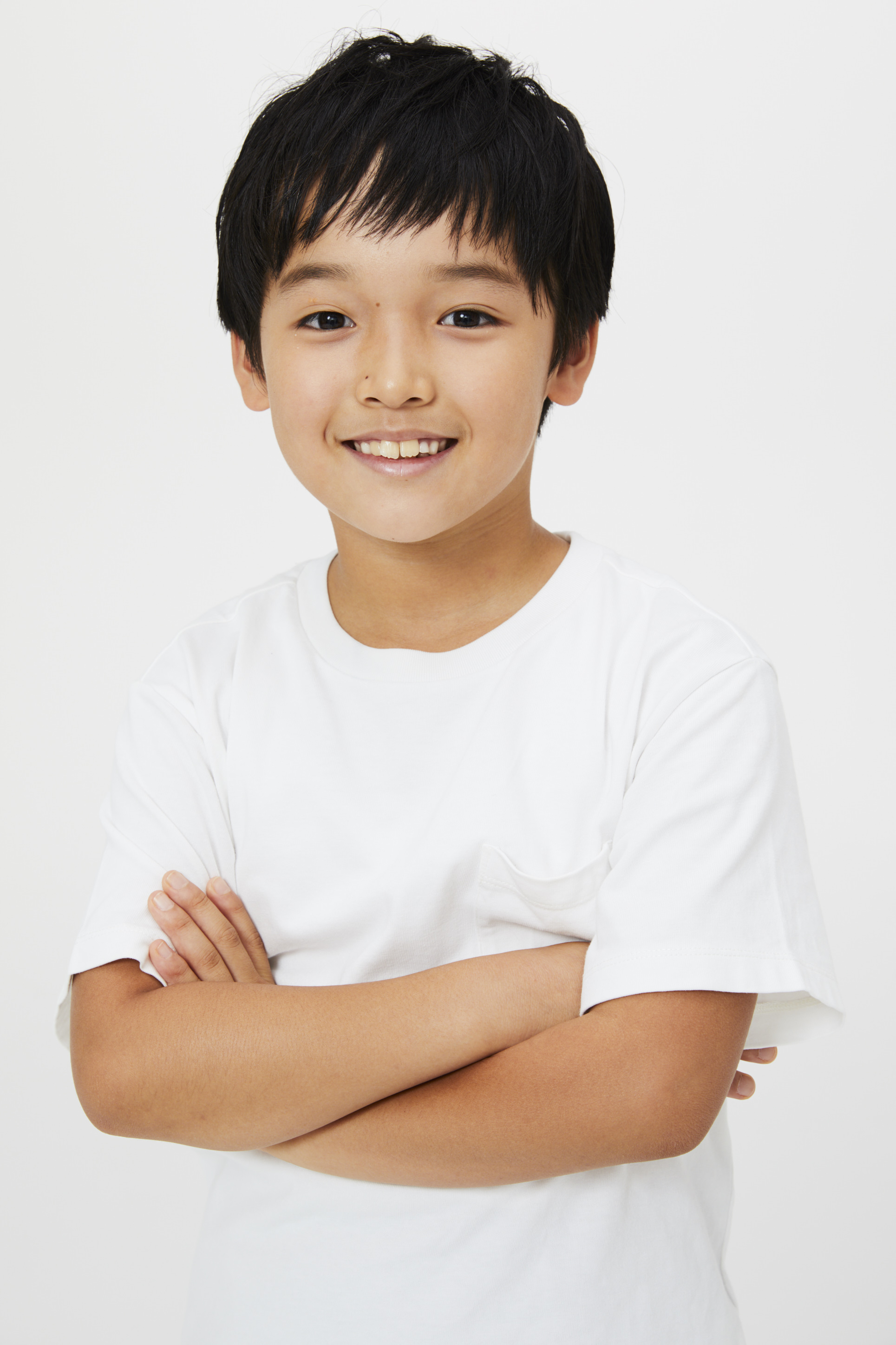 プロフィール写真